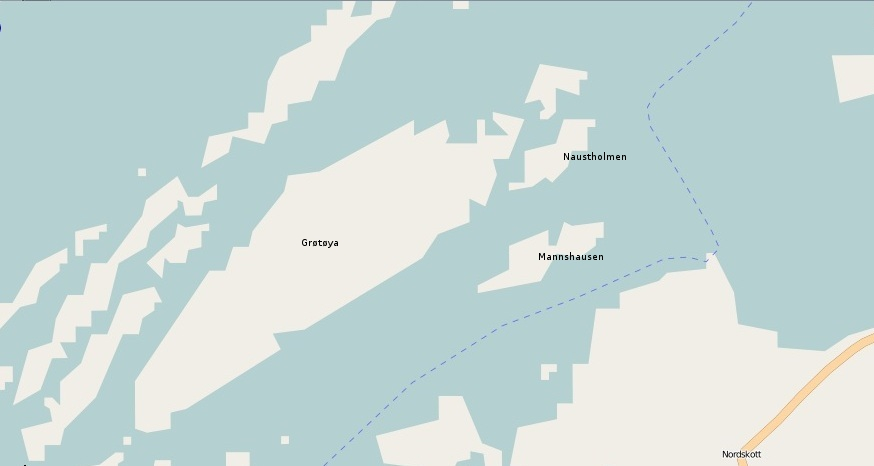 Norsk (bokmål): Grøtøy handelssted i Steigen med hovedøya Grøtøya og de to øyene/holmene Mannshausen og Naustholmen.